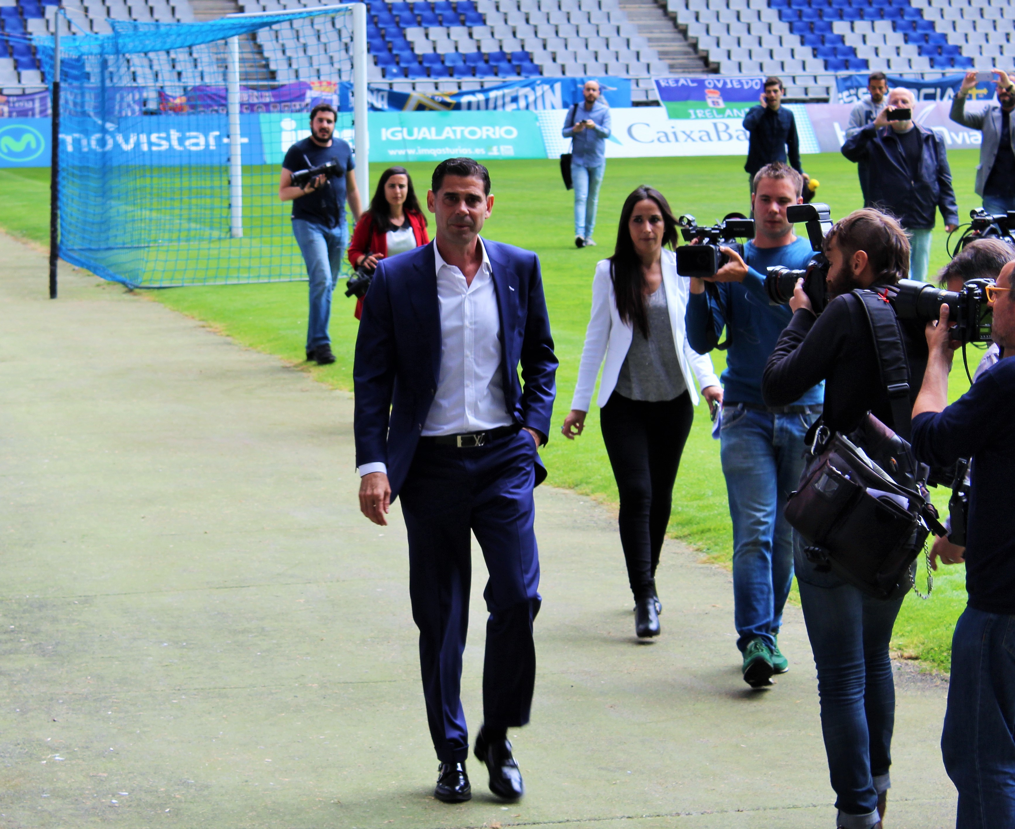 Presentación de Fernando Hierro como entrenador del Real Oviedo.